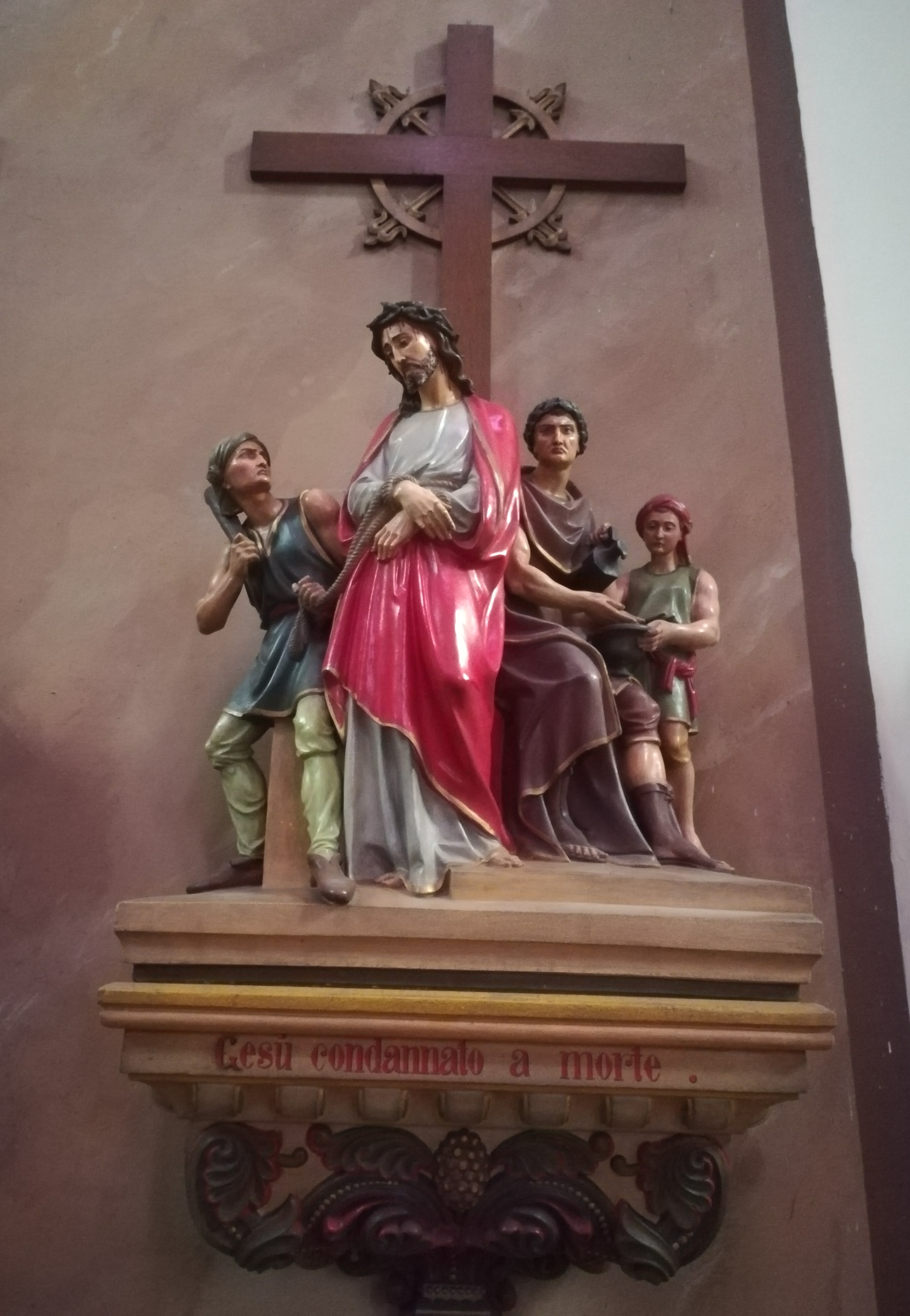 Stazioni via Crucis - Chiesa Nostra Signora della Salute - Torino